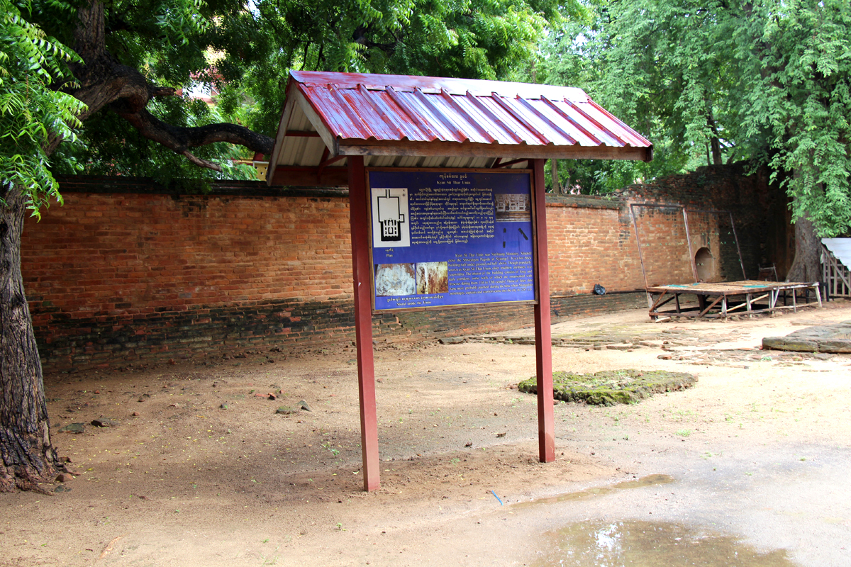 မြန်မာဘာသာ: ကျန်စစ်သားဥမင် အတွင်းပိုင်း